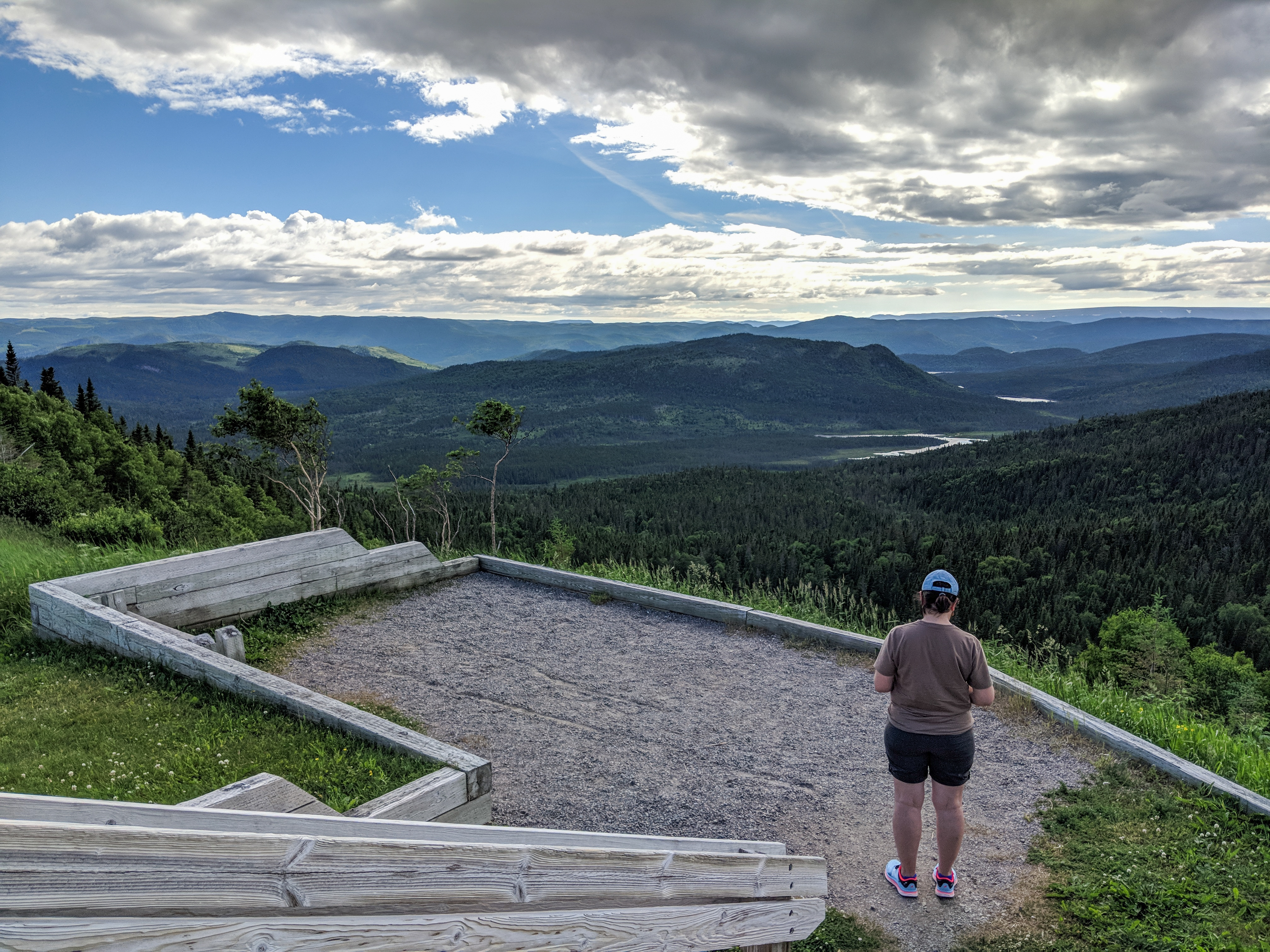 Gros Morne NP